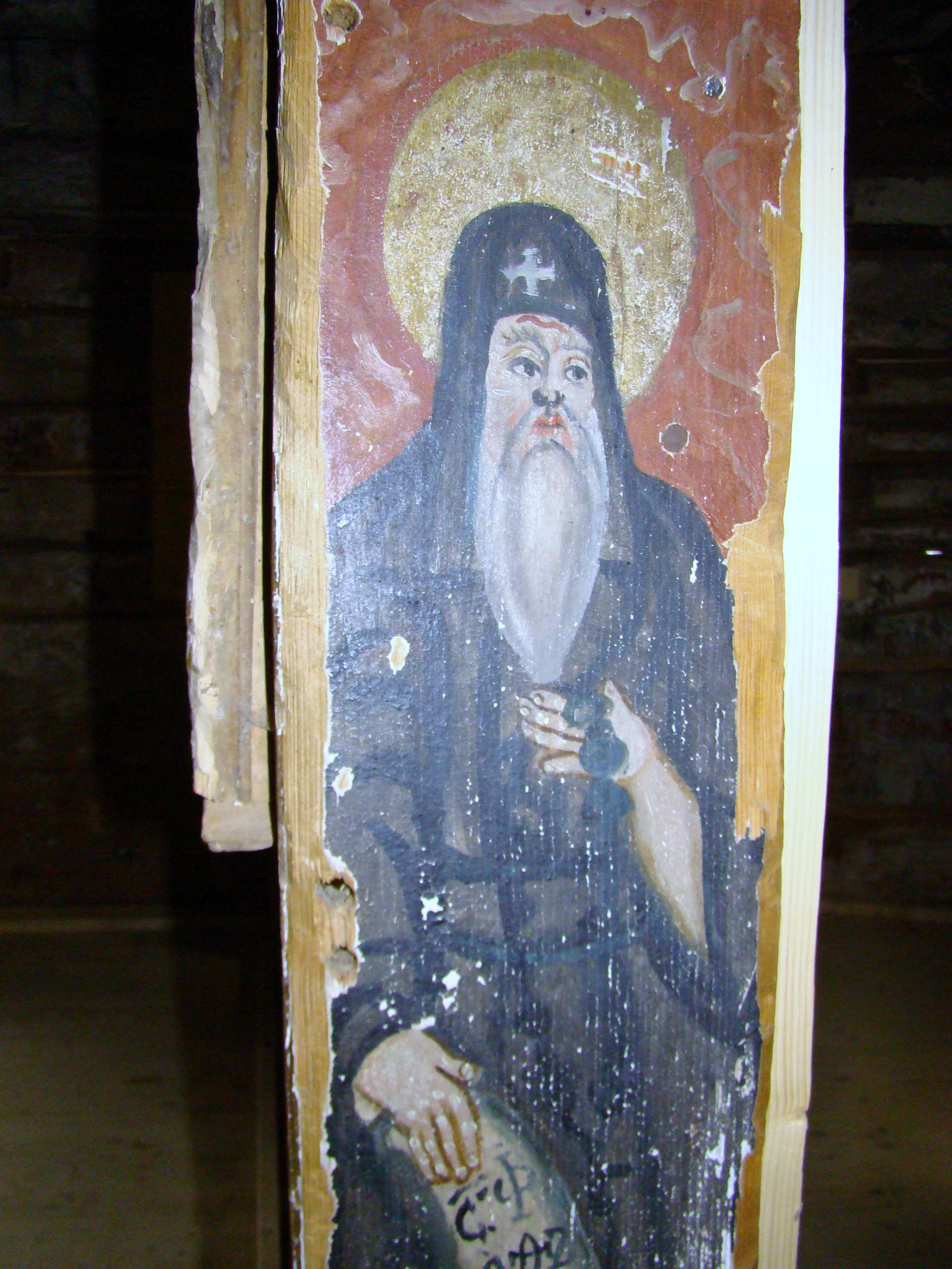 Biserica de lemn "Adormirea Maicii Domnului" a fostei mănăstiri "Izvoru Negru" , sat MOISEI 01